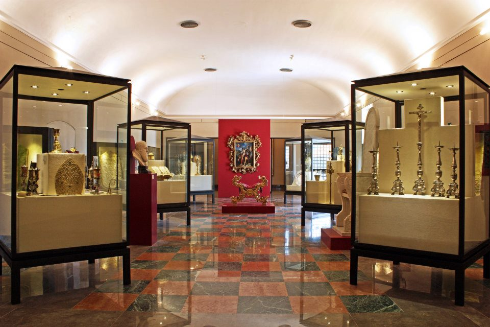 Sala dei Vescovi, Museo Diocesano di Monreale- Italia